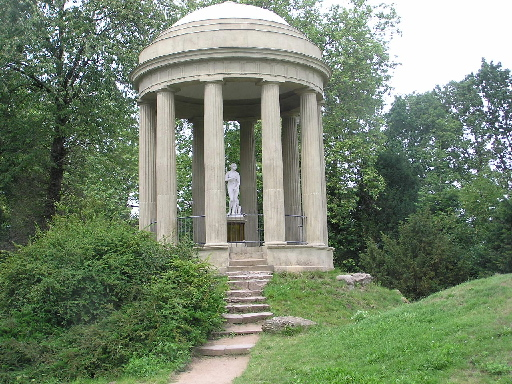 Venustempel